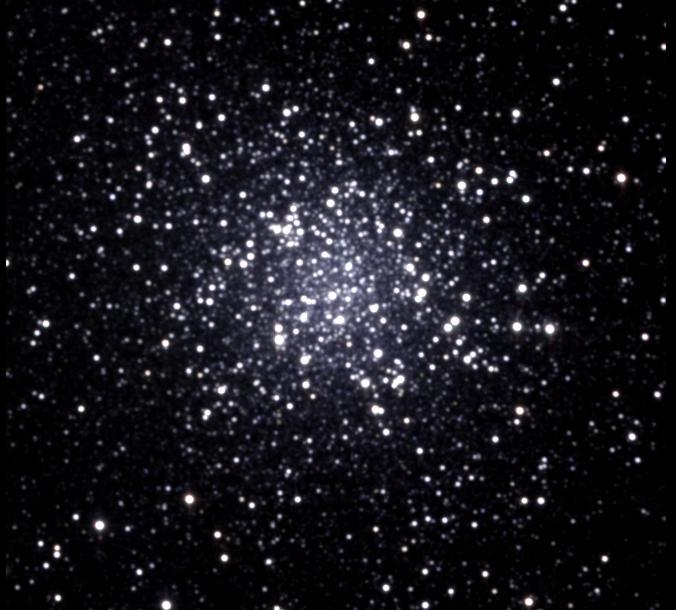 Messier 22, Globular Cluster